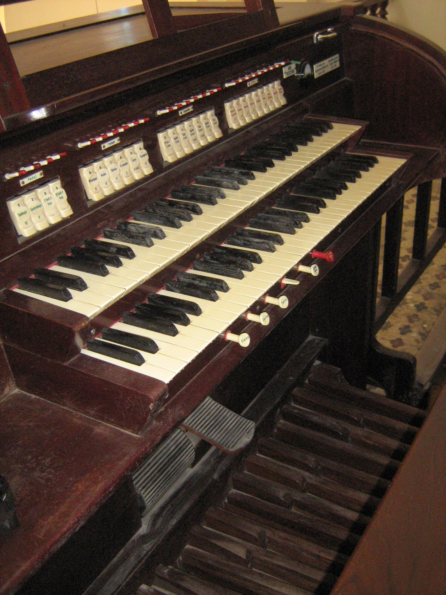 Consola del órgano E.F. Walcker de la Basílica de Yarumal, Antioquia, Colombia.